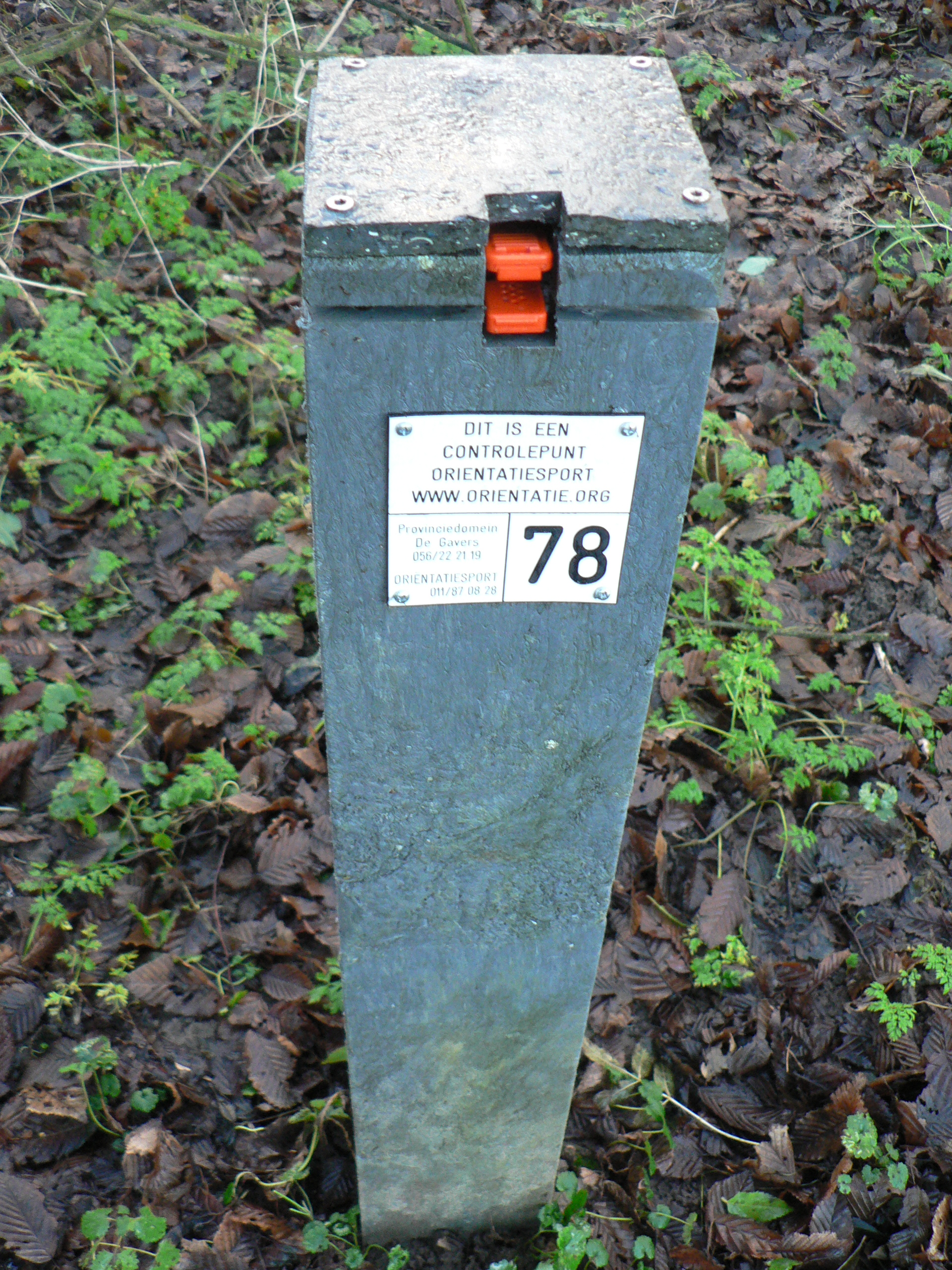 De Gavers (Harelbeke-Deerlijk) thv parking oost (Deerlijk) - - own picture